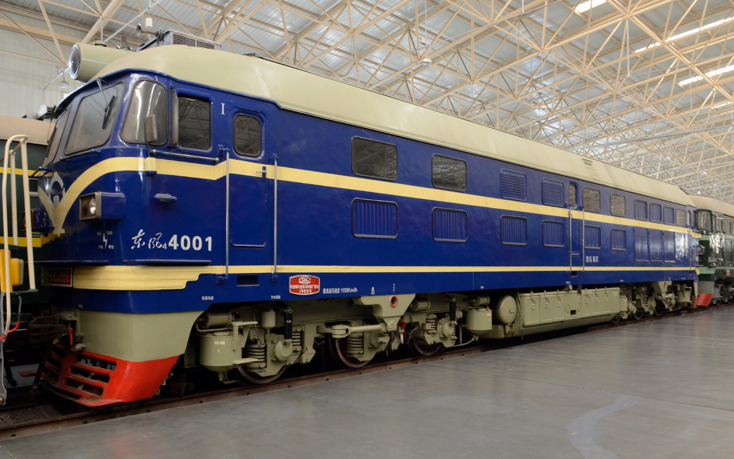 配属沈阳铁路局锦州机务段的首台东风4C型(东风4 4001)机车在中国铁道博物馆保存展示。